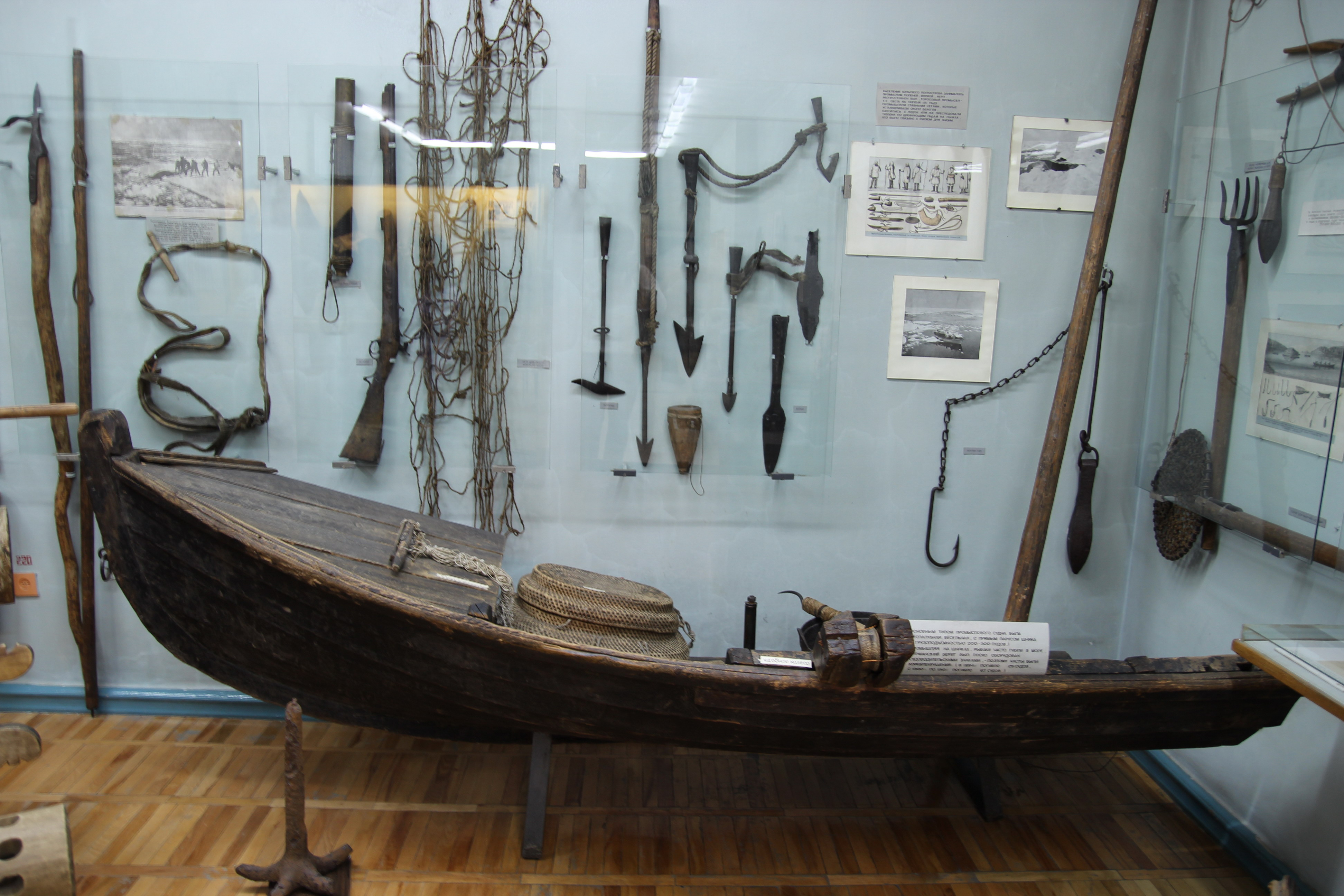 Часть Шняки